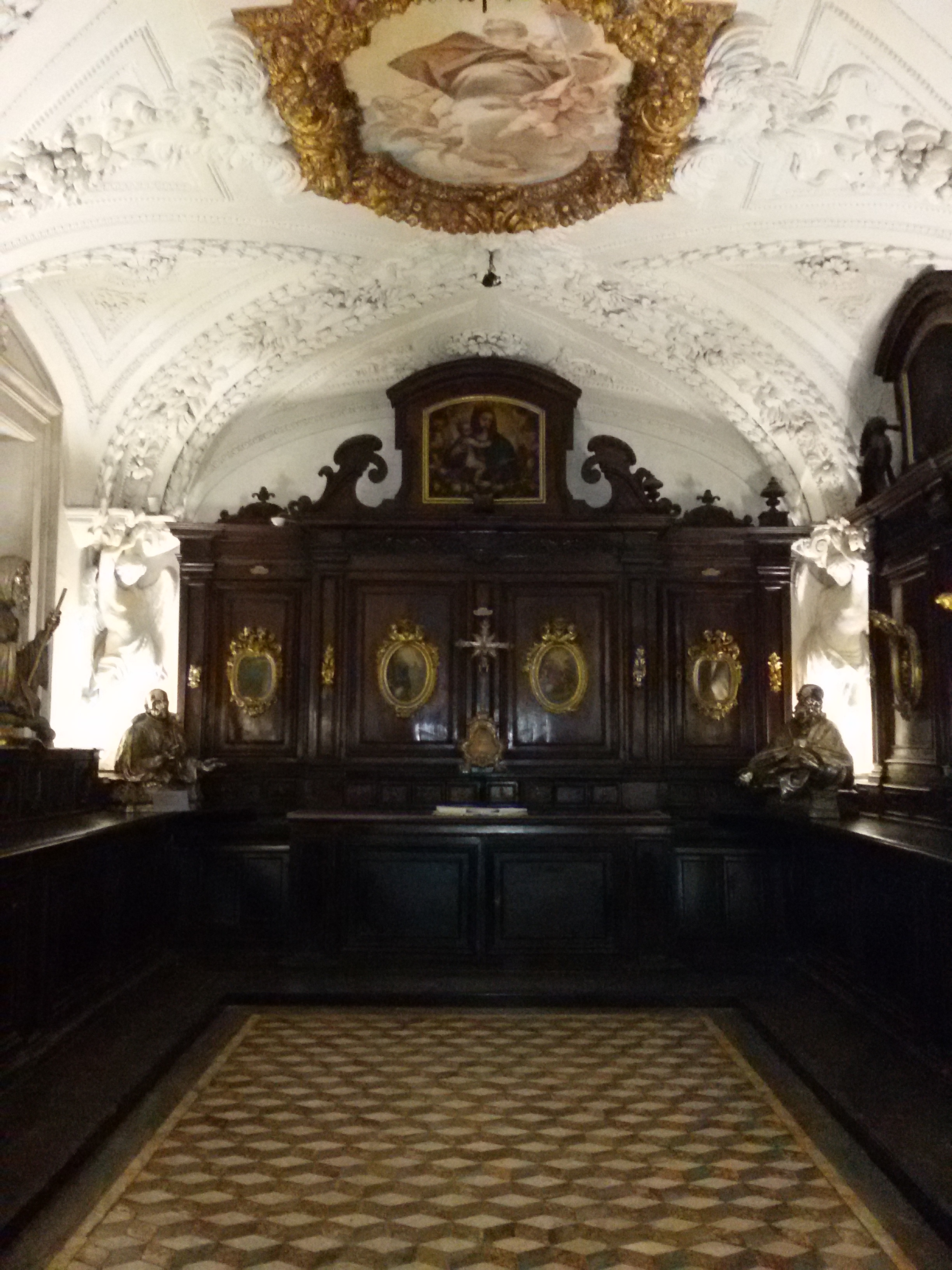 Sacrestia - Reale cappella del Tesoro di San Gennaro (Museo del Tesoro)